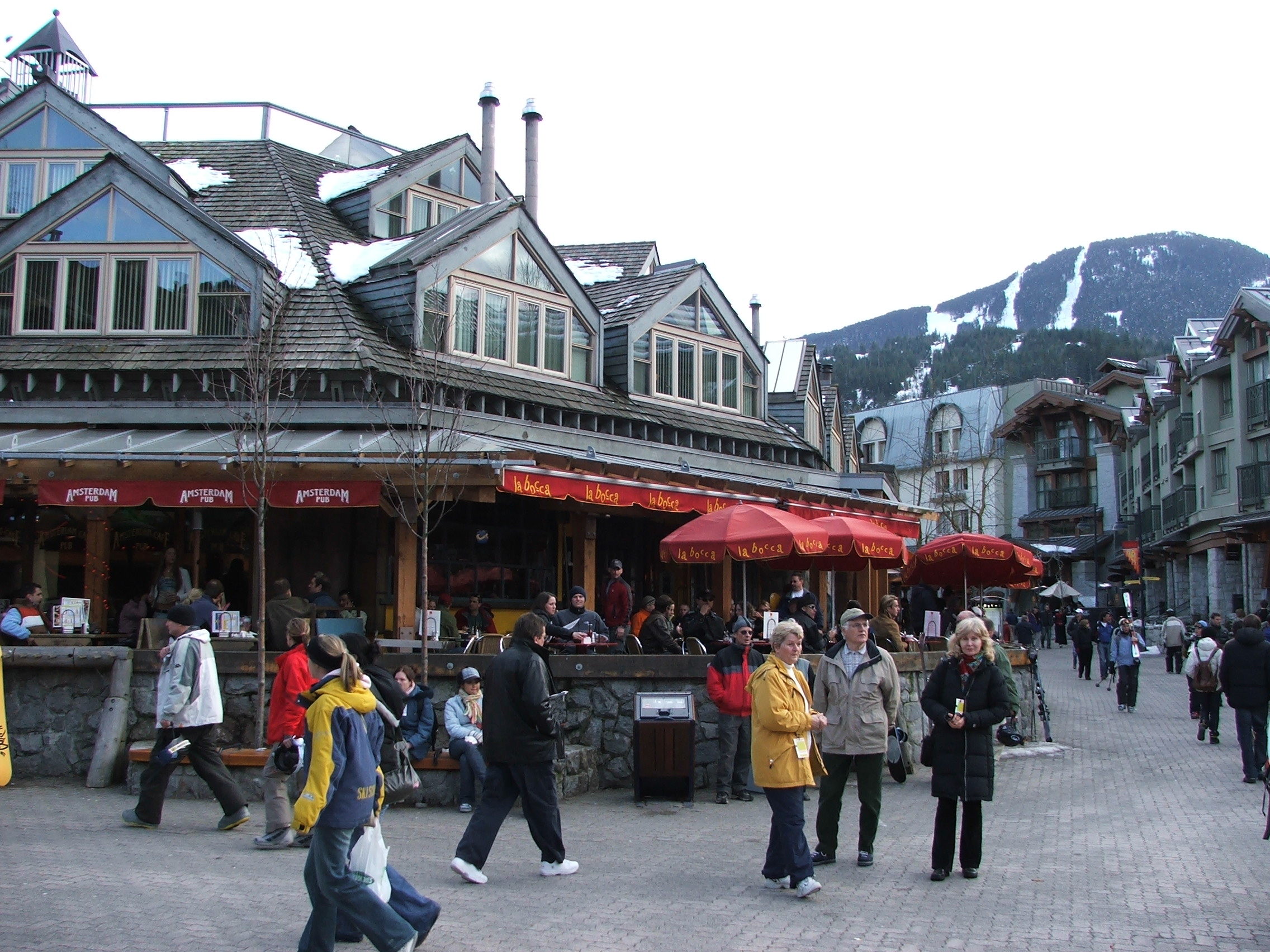 Центар Вислера (слику направио Борис Малагурски) ☺ Ову слику је направио Борис Малагурски.